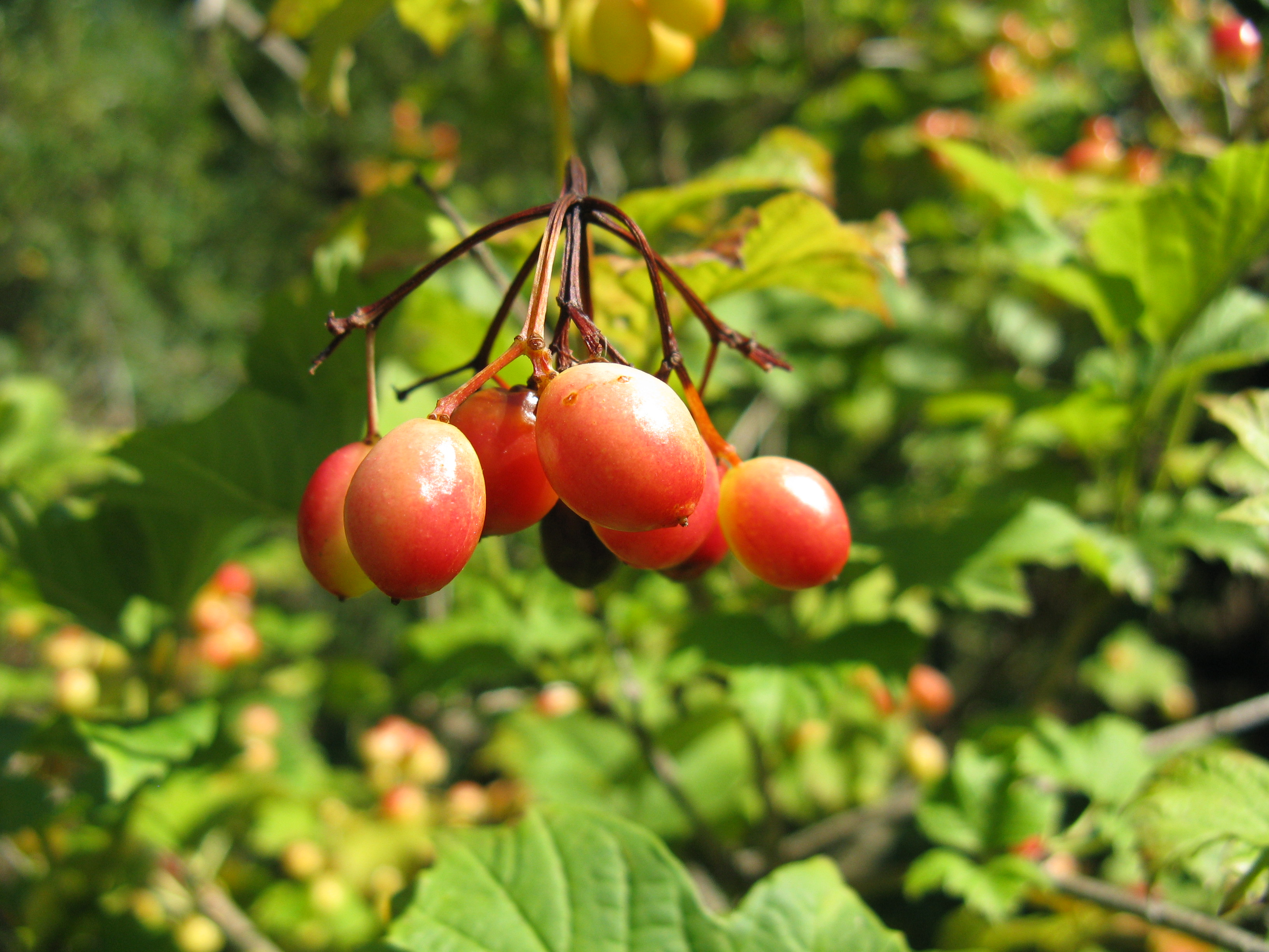 Scientific name Viburnum trilobum